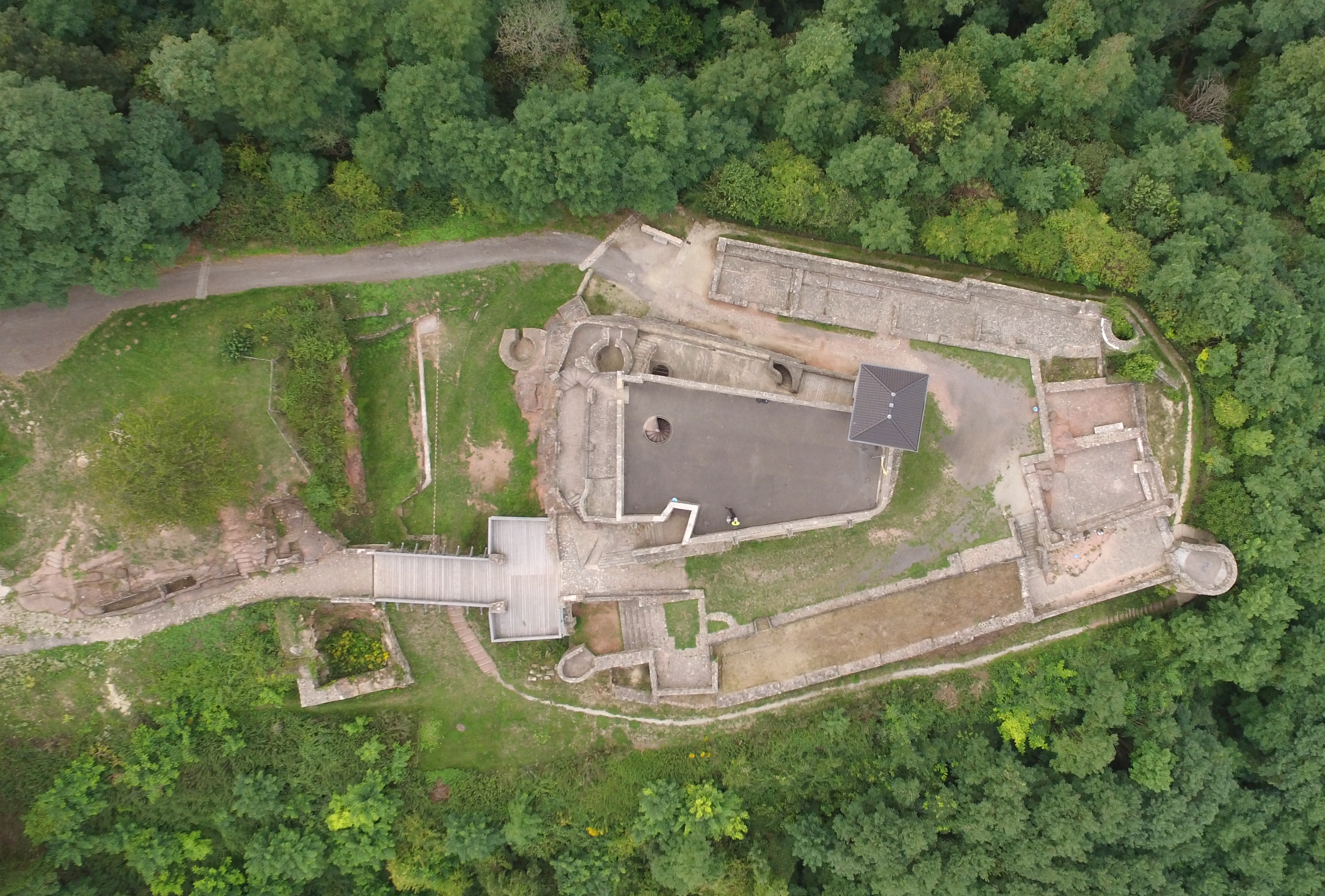 Teufelsburg von oben